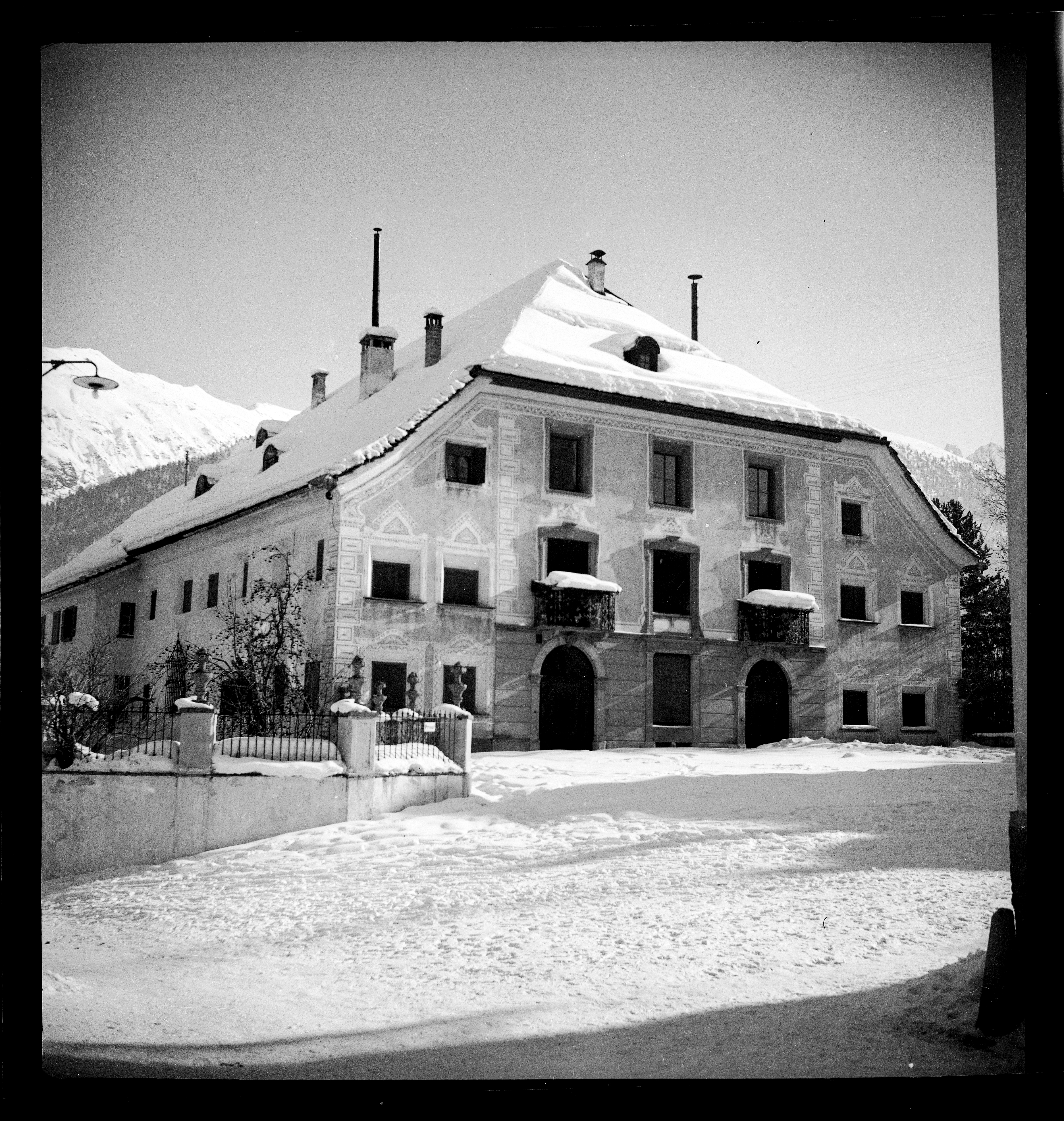 Schweiz, Samedan: Haus; Chesa Planta in Samedan; Samedan